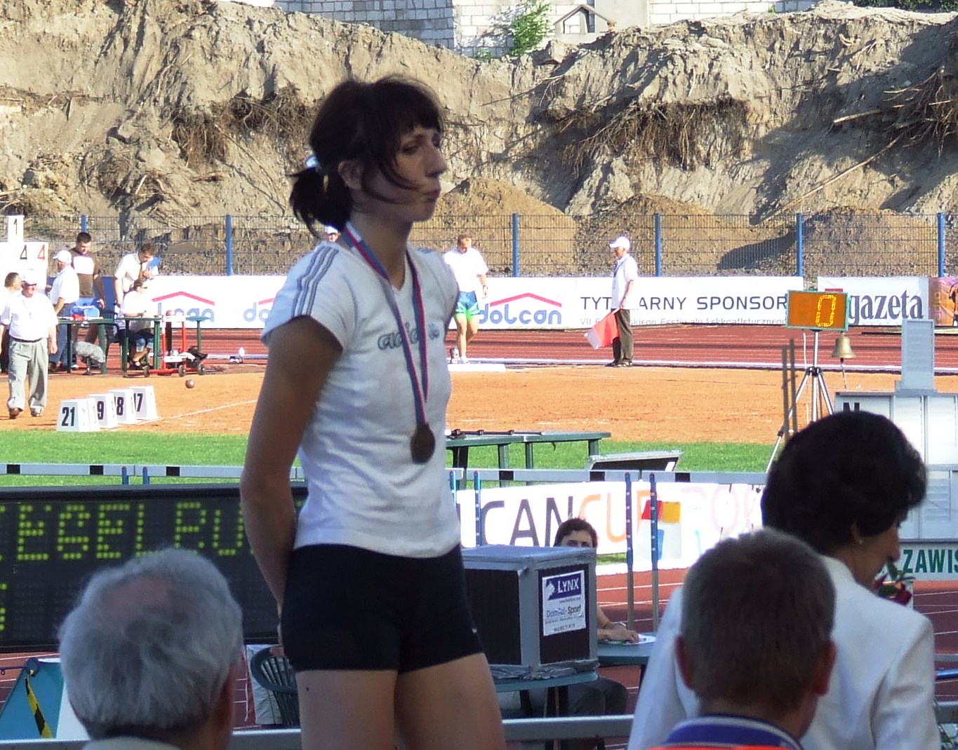 Joanna Kocielnik, polska biegaczka (100 m ppł), Bydgoszcz Dolcan Cup 2007